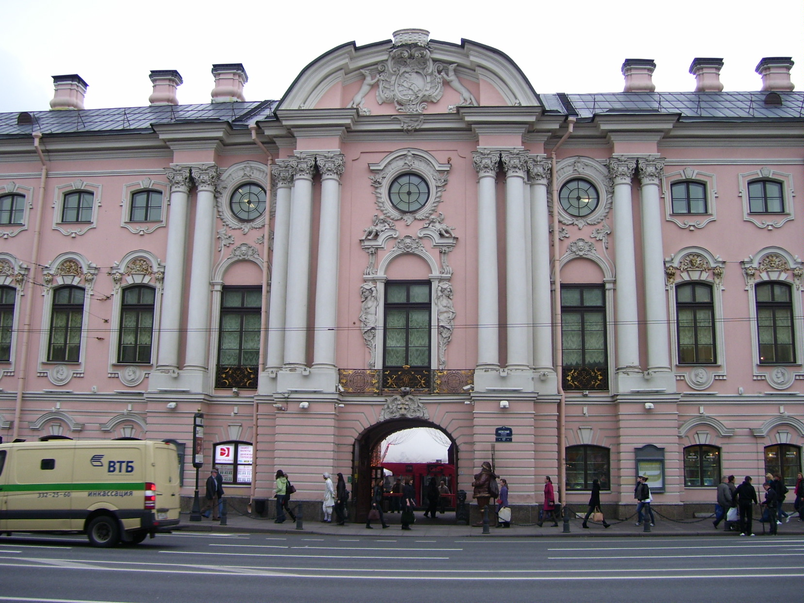 Строгановский дворец (Санкт-Петербург)